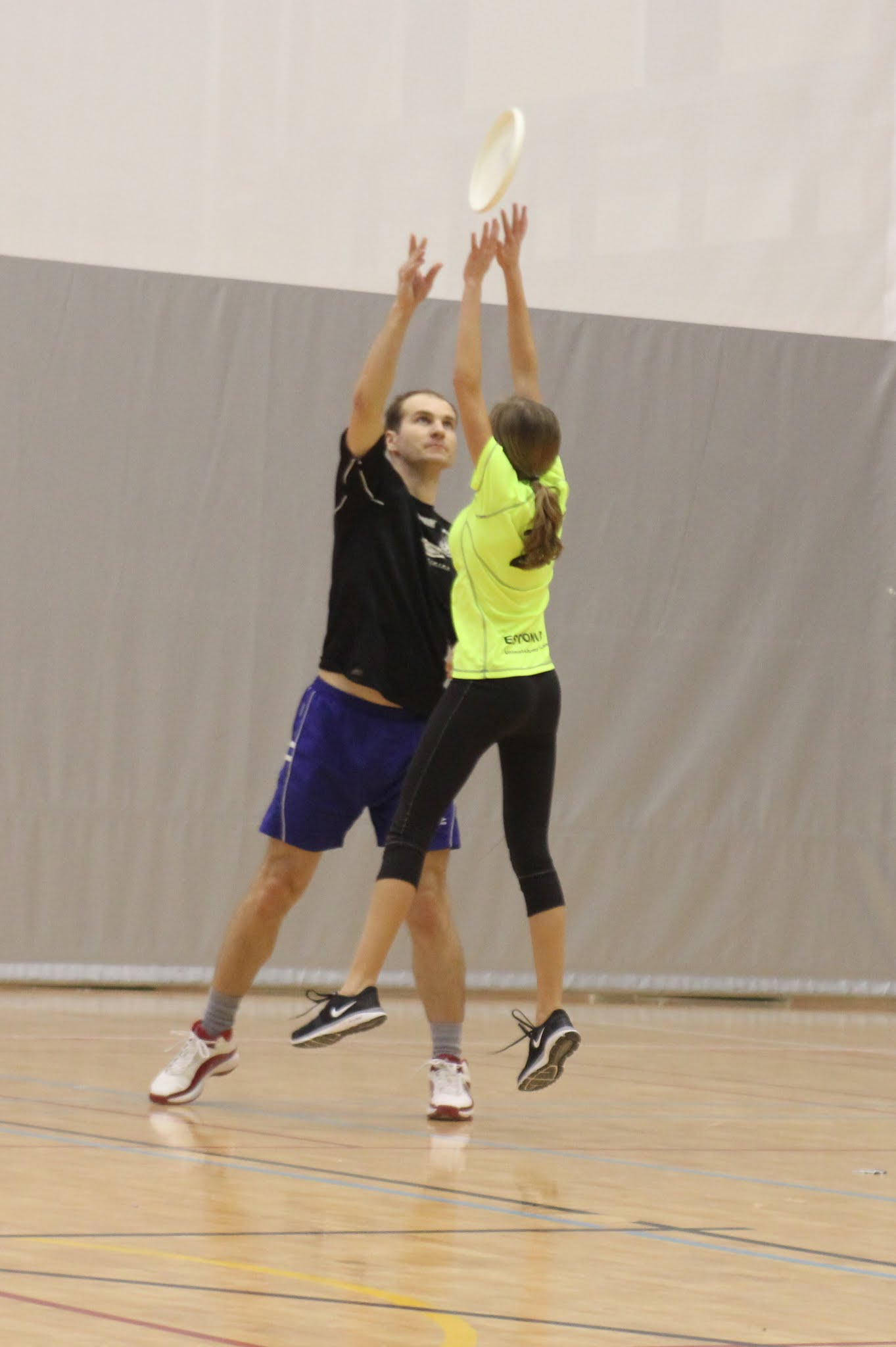 Tartu frisbeeklubi. A. le Coqi spordihoone Tartus.